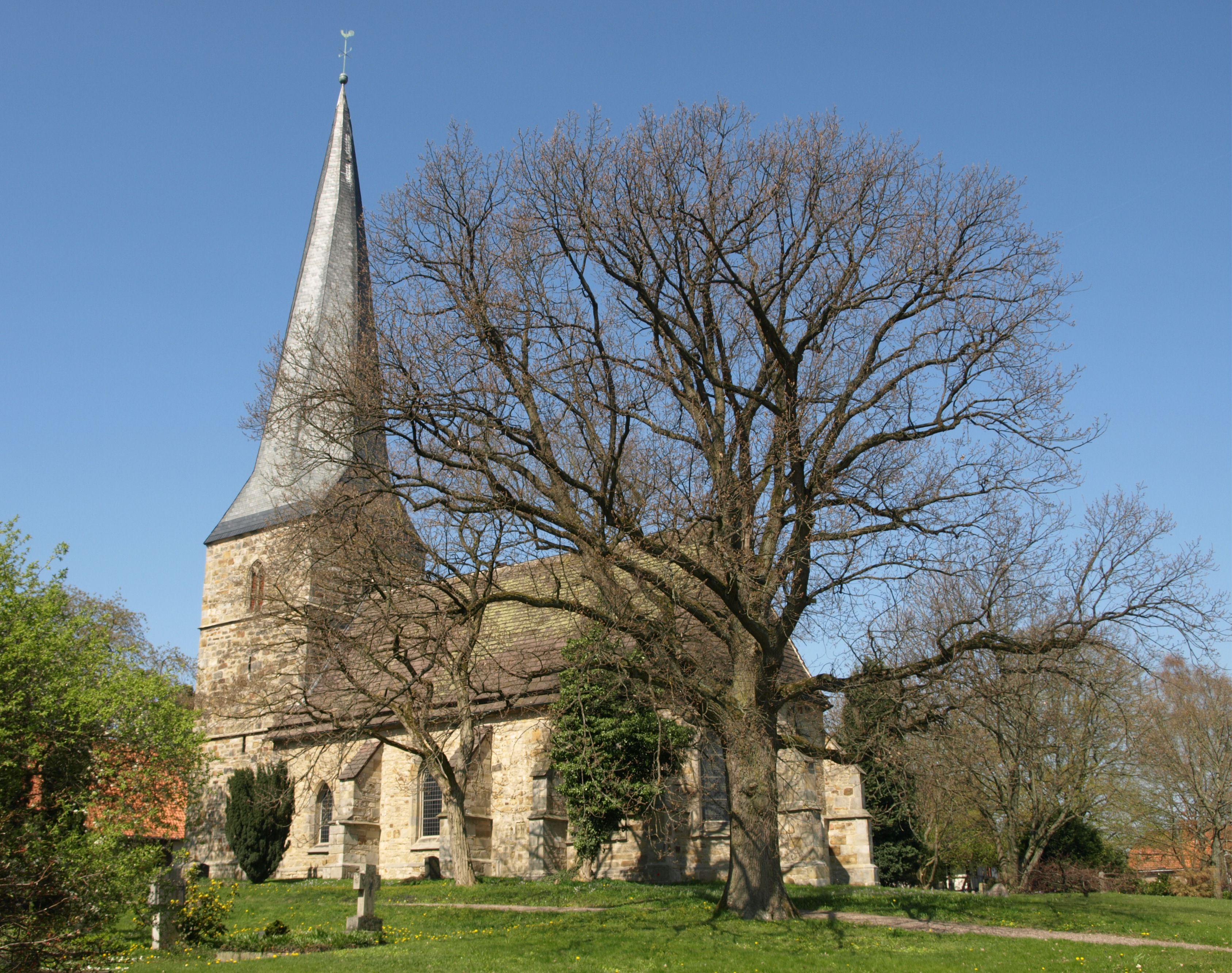 Church of St. Magnus in Beber (Bad Muender / Germany)